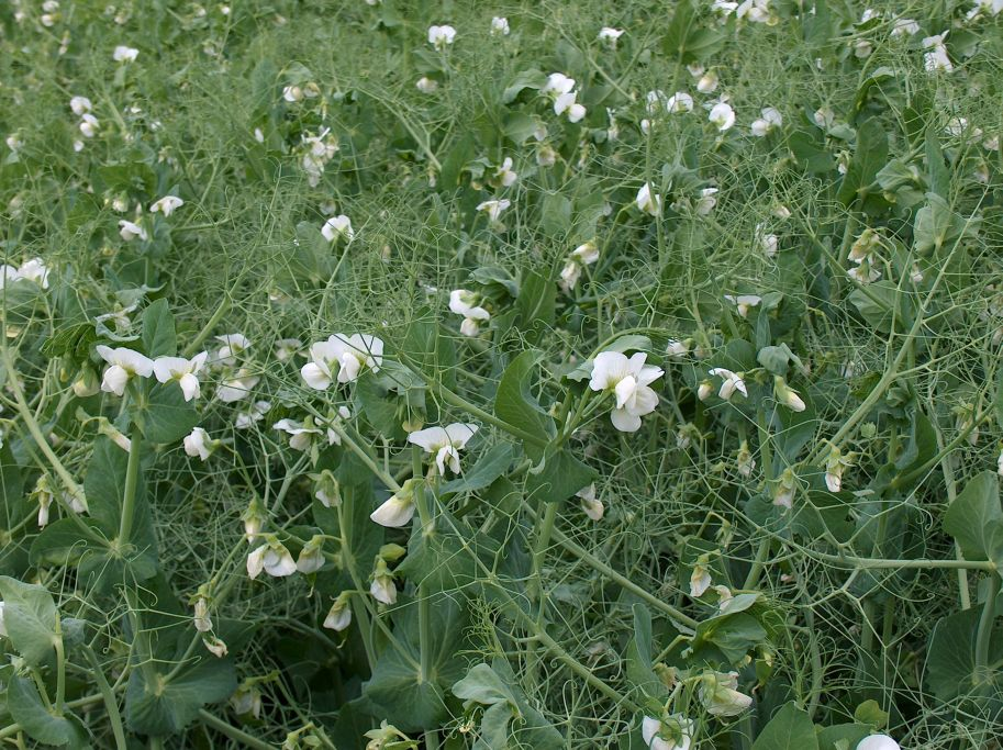 Erbsen auf einem Feld